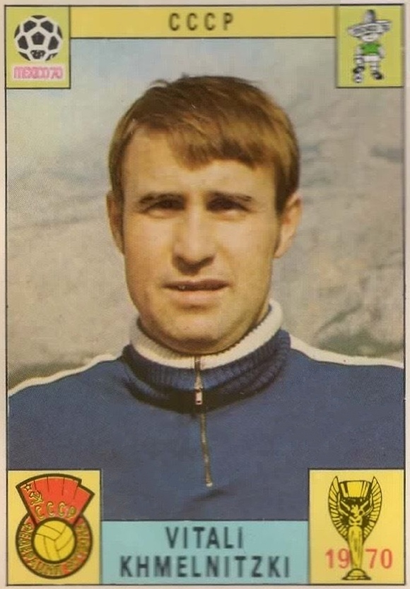 FIGURINA CALCIATORI PANINI MEXICO 70 - RECUPERO - KHMELNITZKI - CCCP